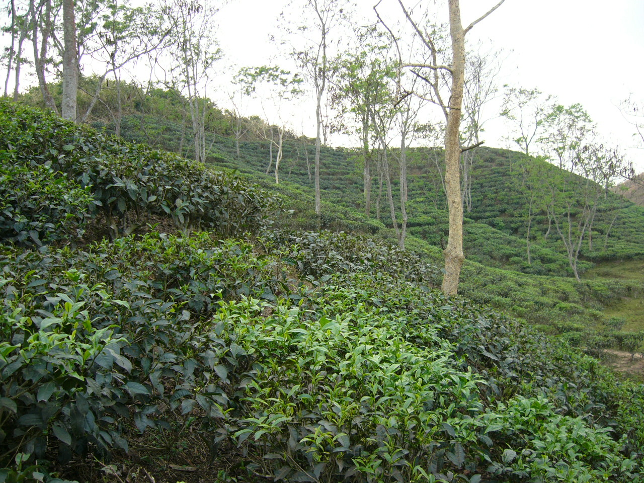 Tea Garden Srimongol Sylhet Bangladesh